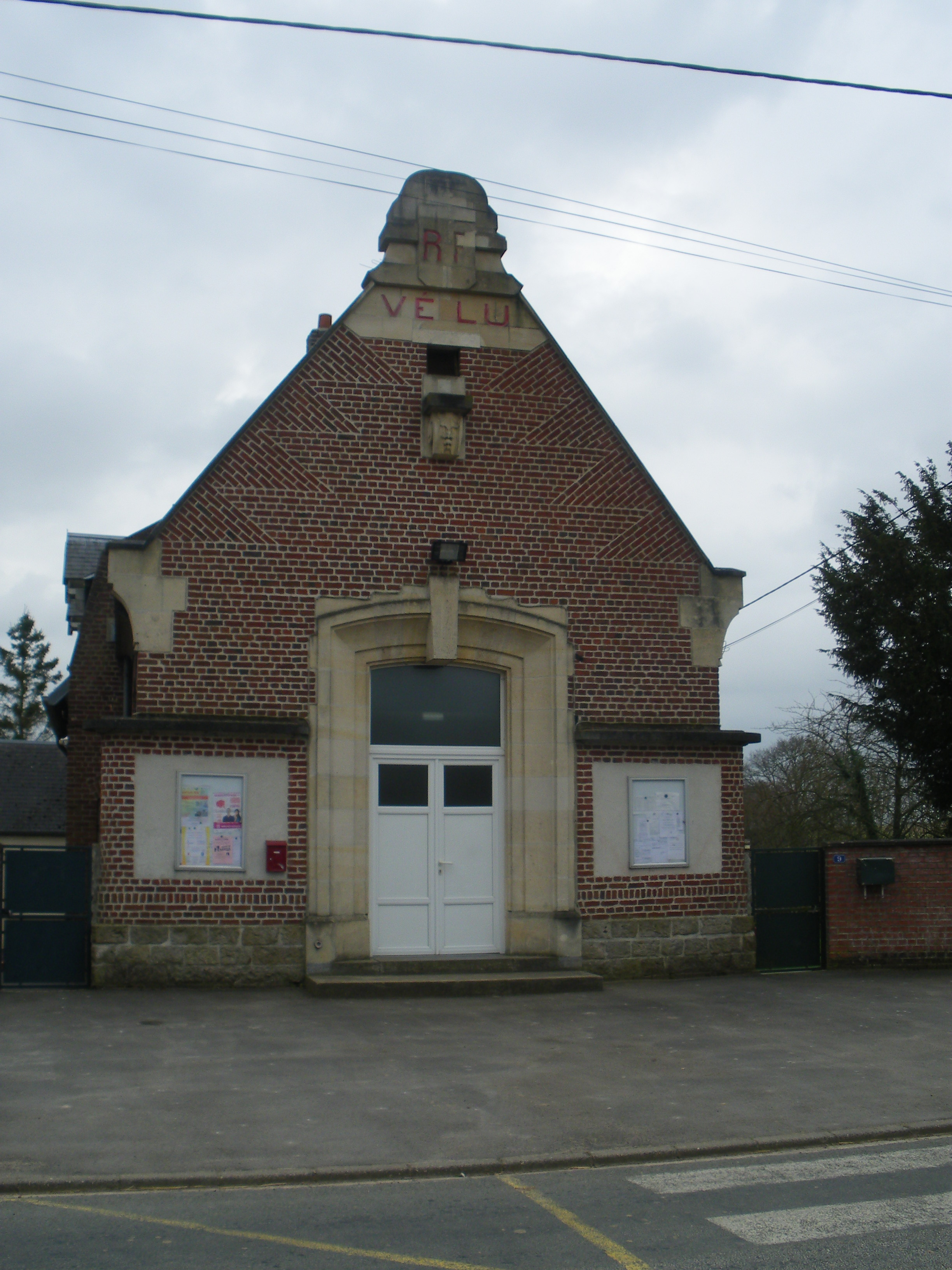 Vue de la mairie de Vélu.